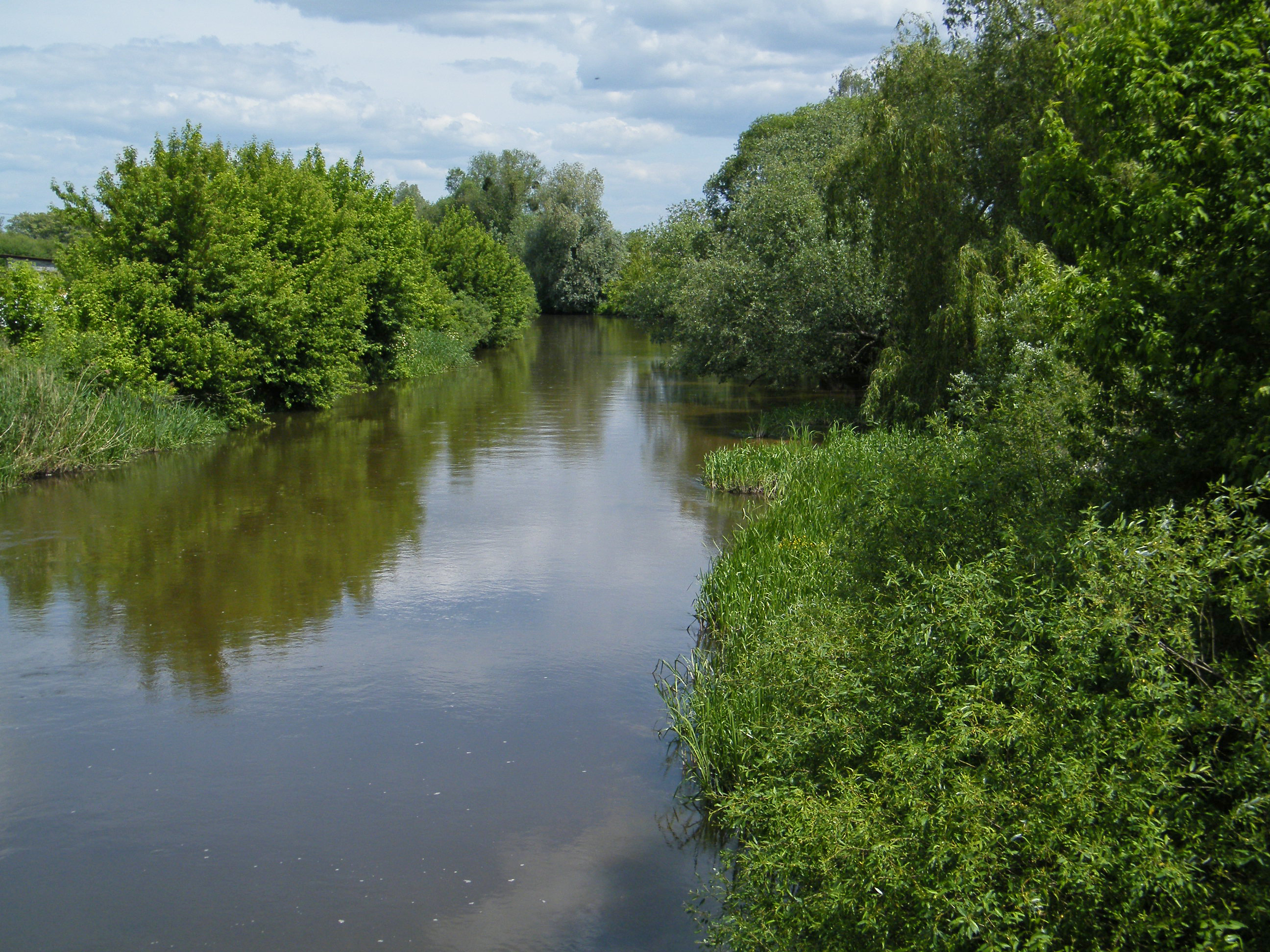 Річка Вілія на околиці Острога